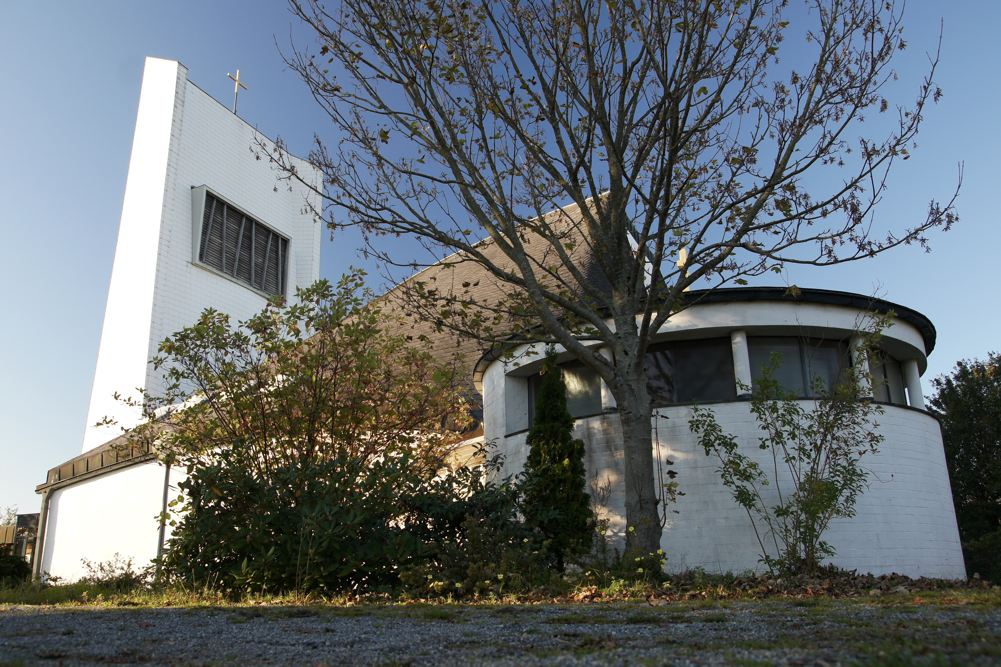 Flensburg-Weiche, An der Friedenskirche 4, Friedenskirche, Denkmal Nr. 1